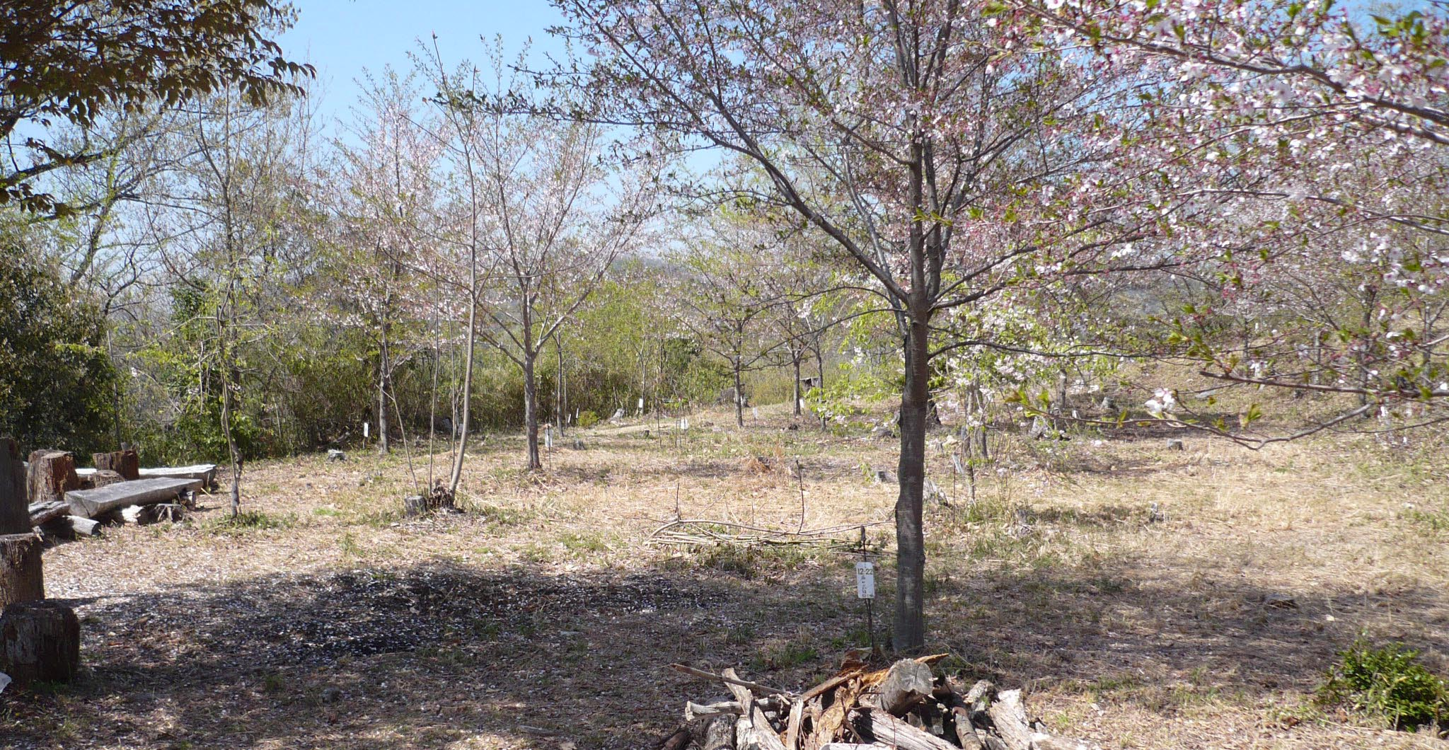 本城曲輪跡